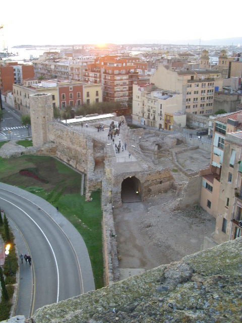 Zona restos Circo Romano, Tarragona, novembro 2009